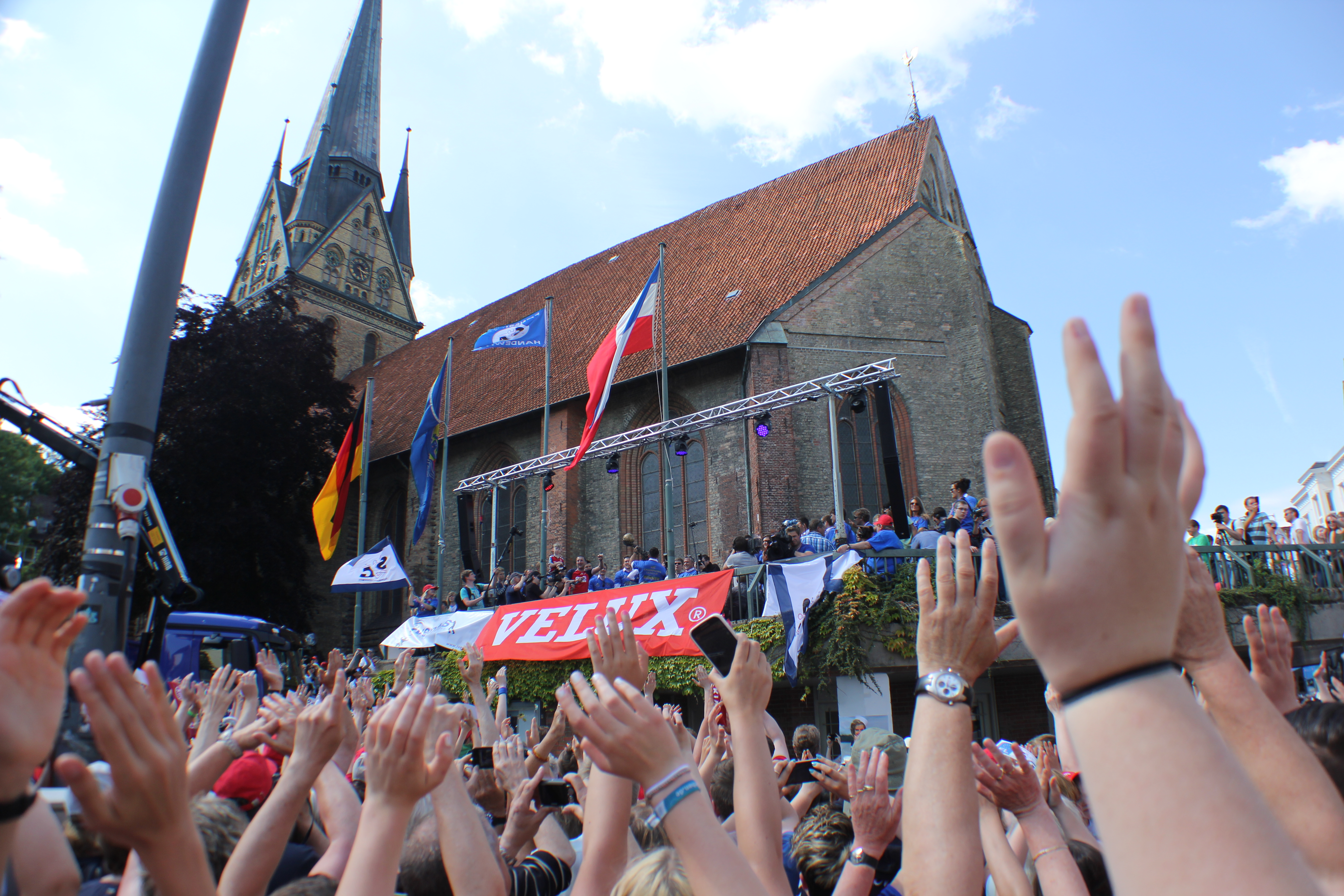 Jubelnde SG (Champions-League-Sieg, SG-Siegesfeier auf Südermarkt), Bild 005